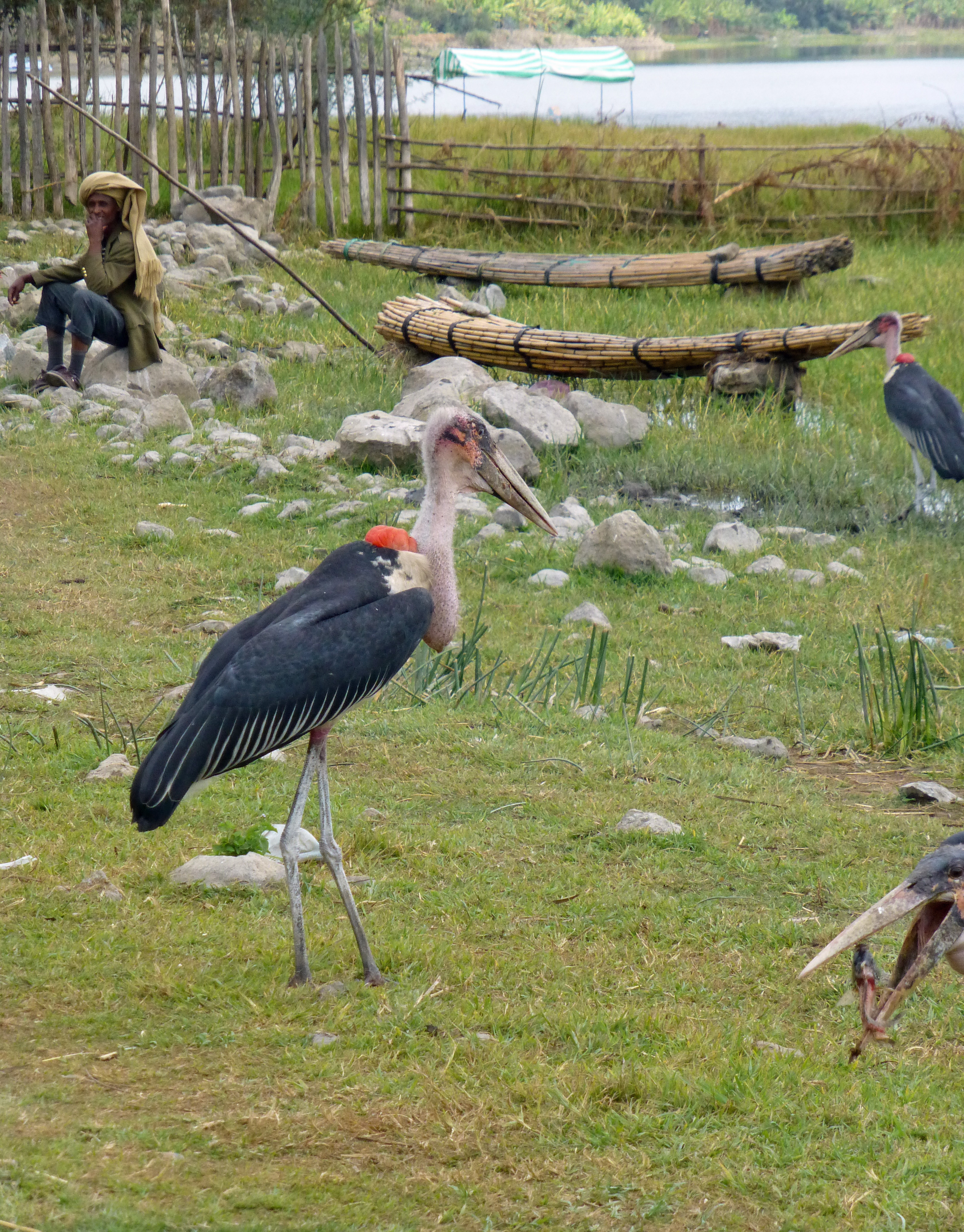 Marabouts d'Afrique (Leptoptilos crumenifer) sur les bords du lac Haïk (région Amhara, Ethiopie)